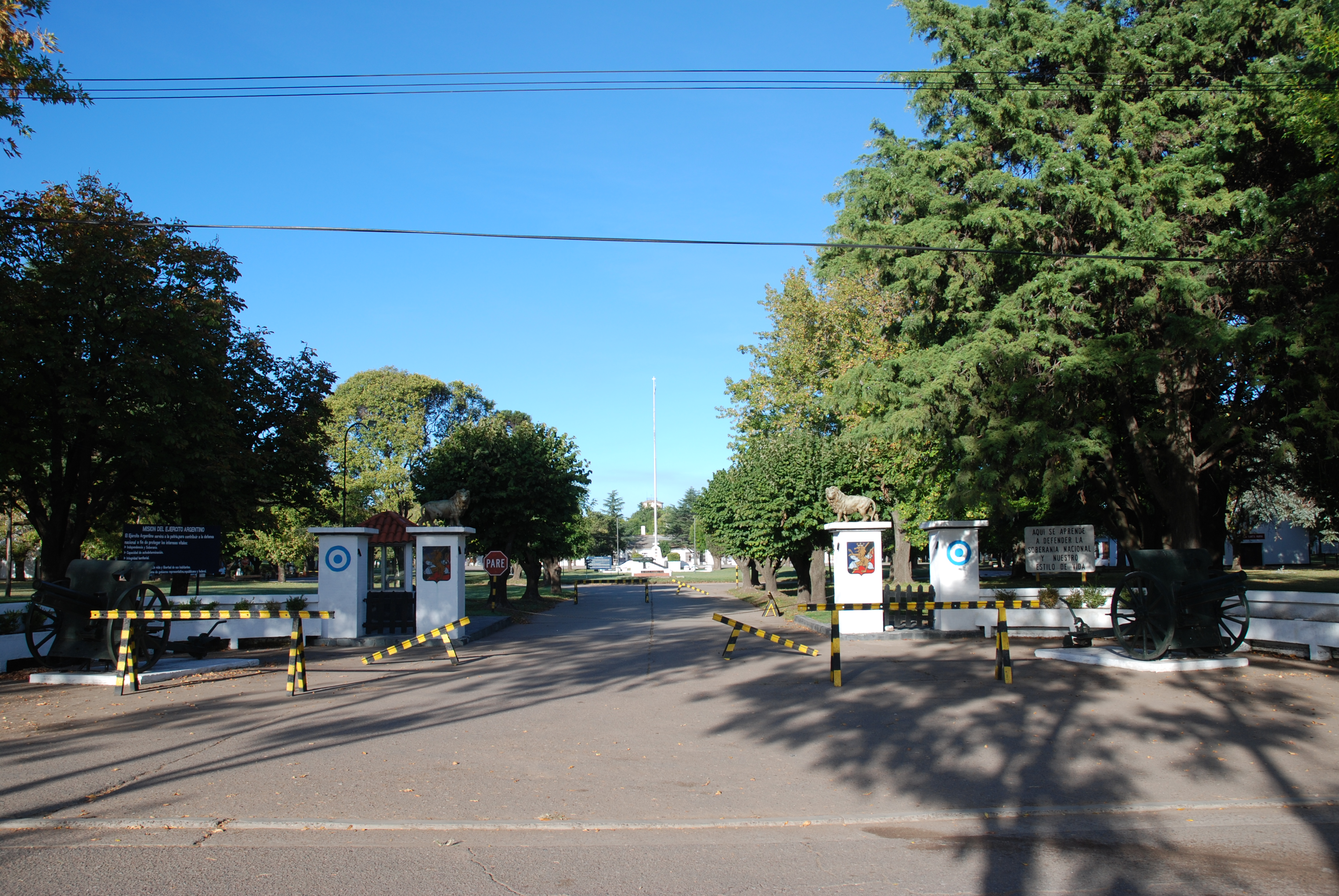 Cuartel de Ejército Junín, asiento del Grupo de Artillería 10 del Ejército Argentino.